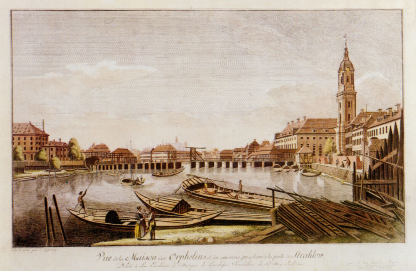 Spree mit Waisenbrücke und Grossem Friedrichs-Hospital (später Friedrichs-Waisenhaus) zu Berlin